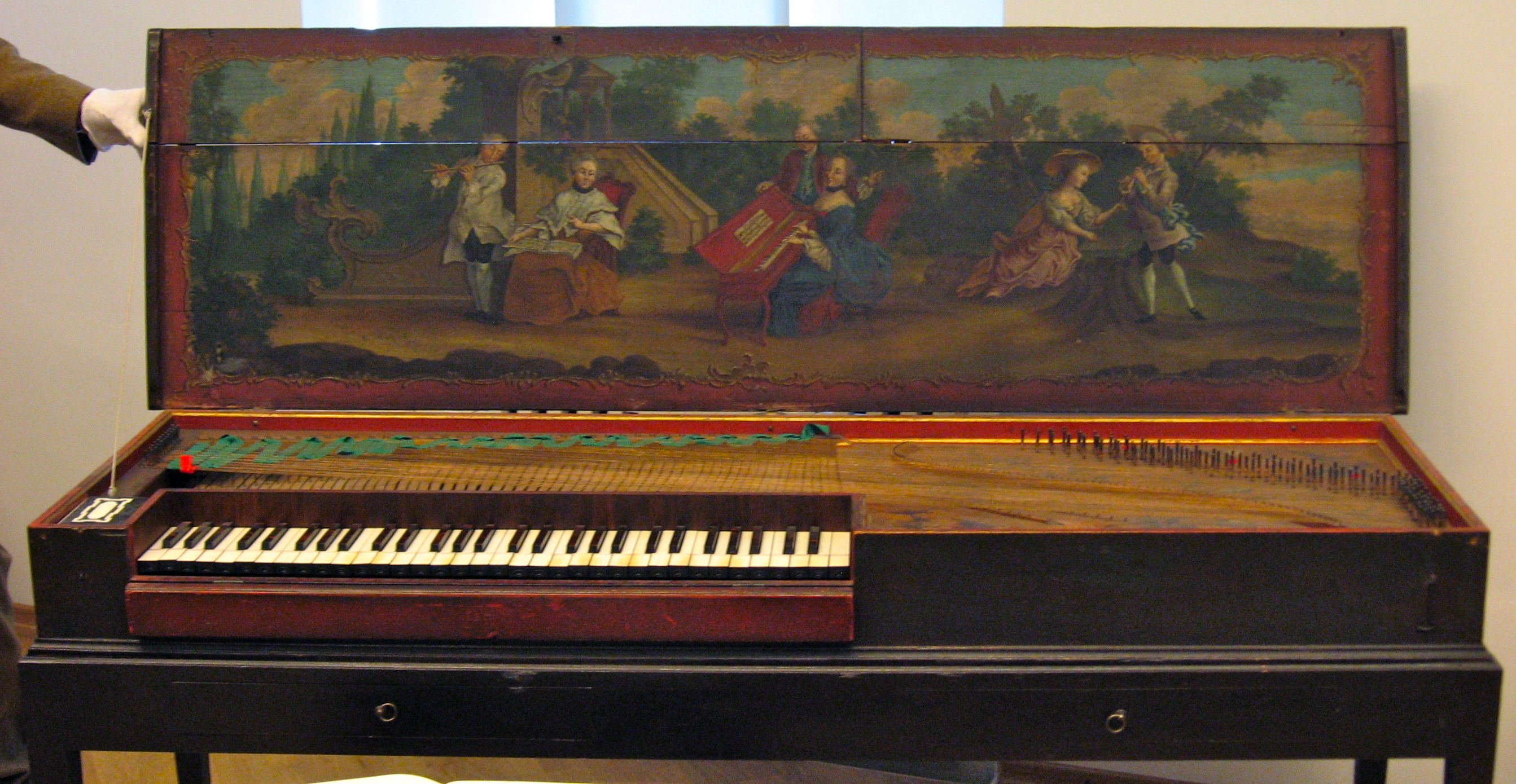 Clavichord von Hieronymus Albrecht Hass, 1742 Hamburg-Museum, Deutschland